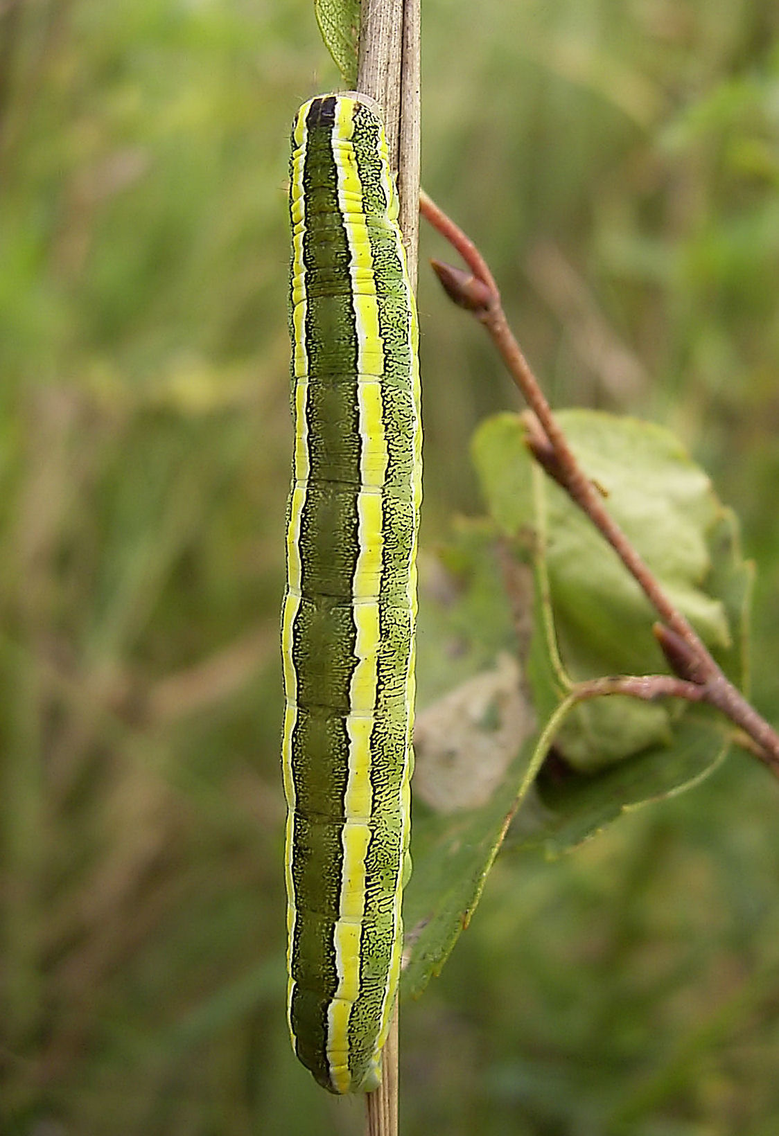 Ceramica pisi